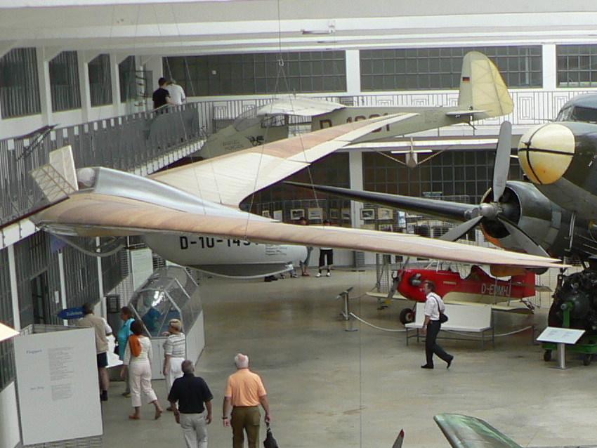 Deutsches Museum in Oberschleissheim, Hall 1